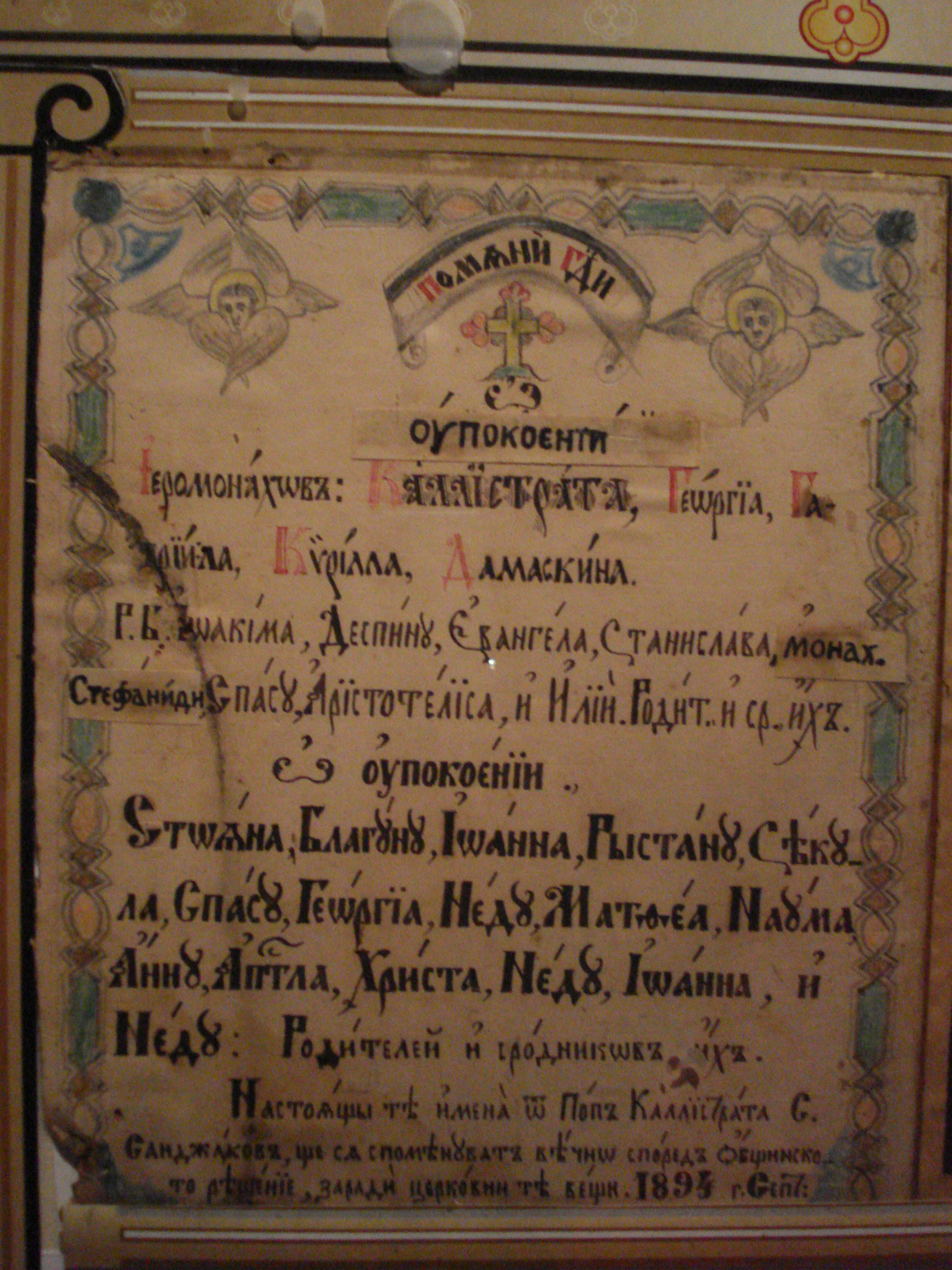 фото